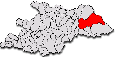 Vişeu de Sus in the district Maramures